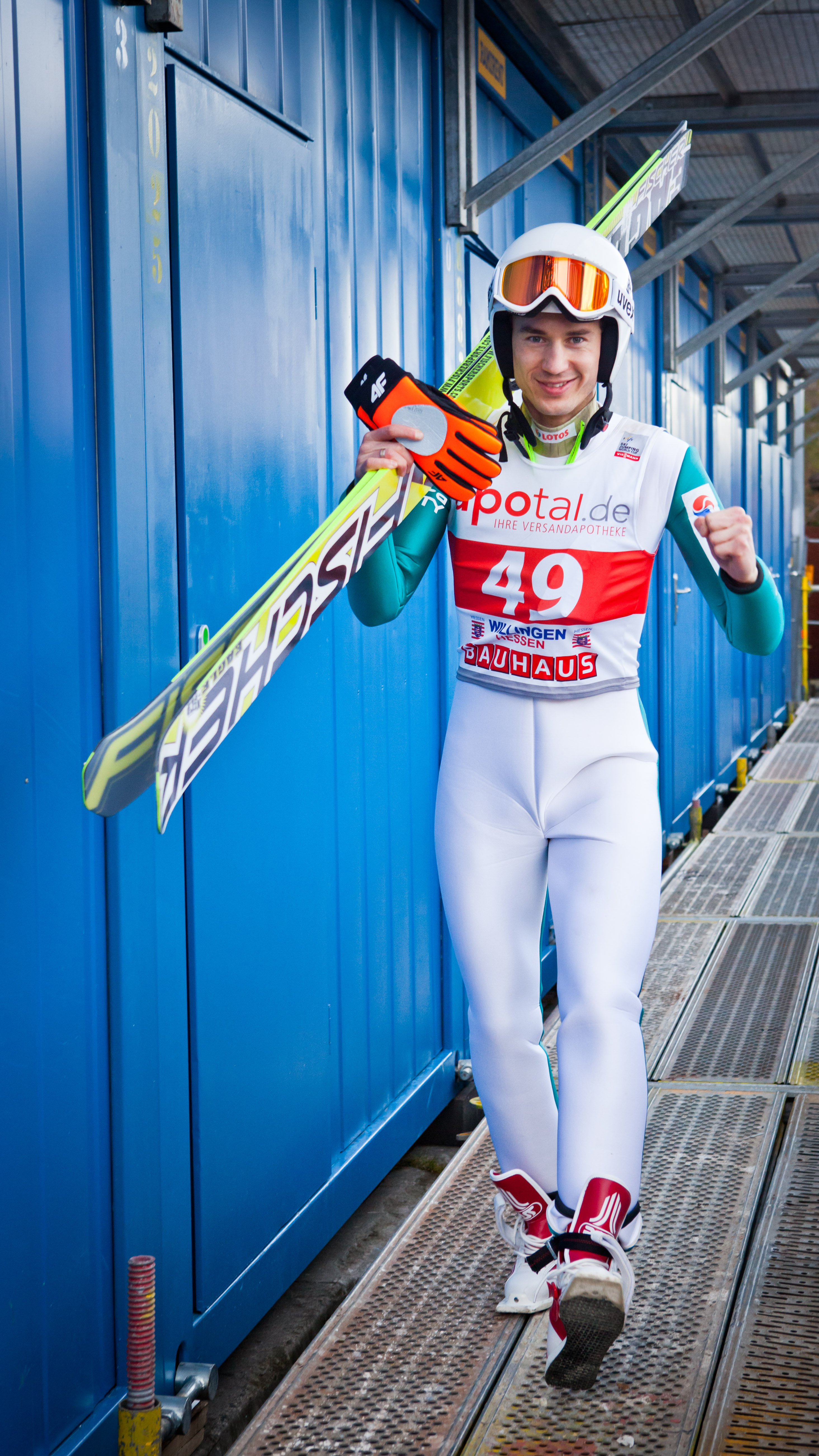 Figura Kamila Stocha